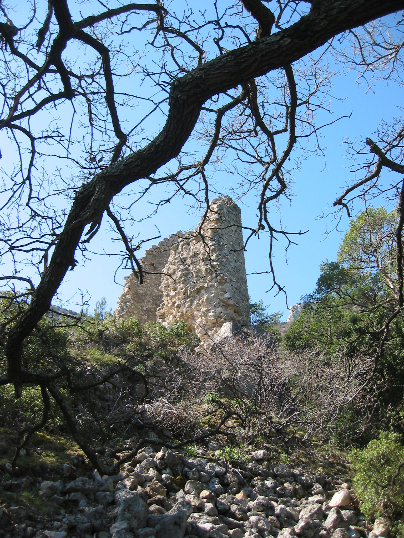 Les ruines du Castellas, au-dessus de Saint-SavourninBouches-du-Rhône, France. Photo prise le 8 avril 2006. Auteur : Ludovic Ruat (utilisateur:civodule)